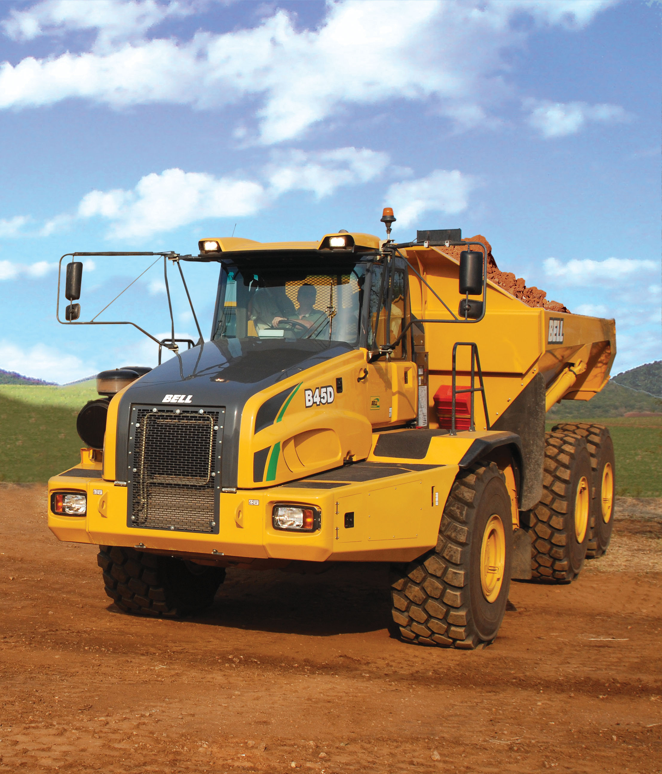 משאית עפר/פירקית BELL B45D